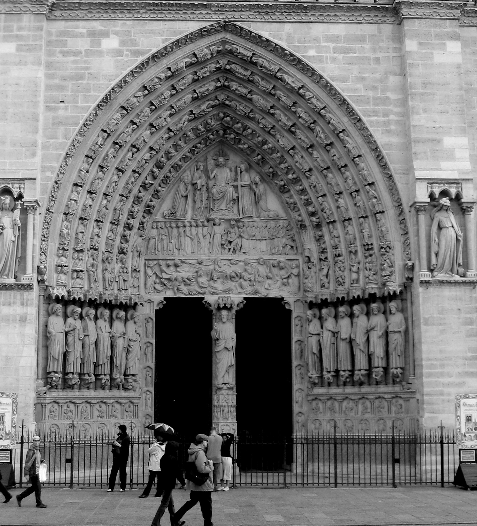 Entrée centrale de la cathédrale Notre-Dame de Paris.